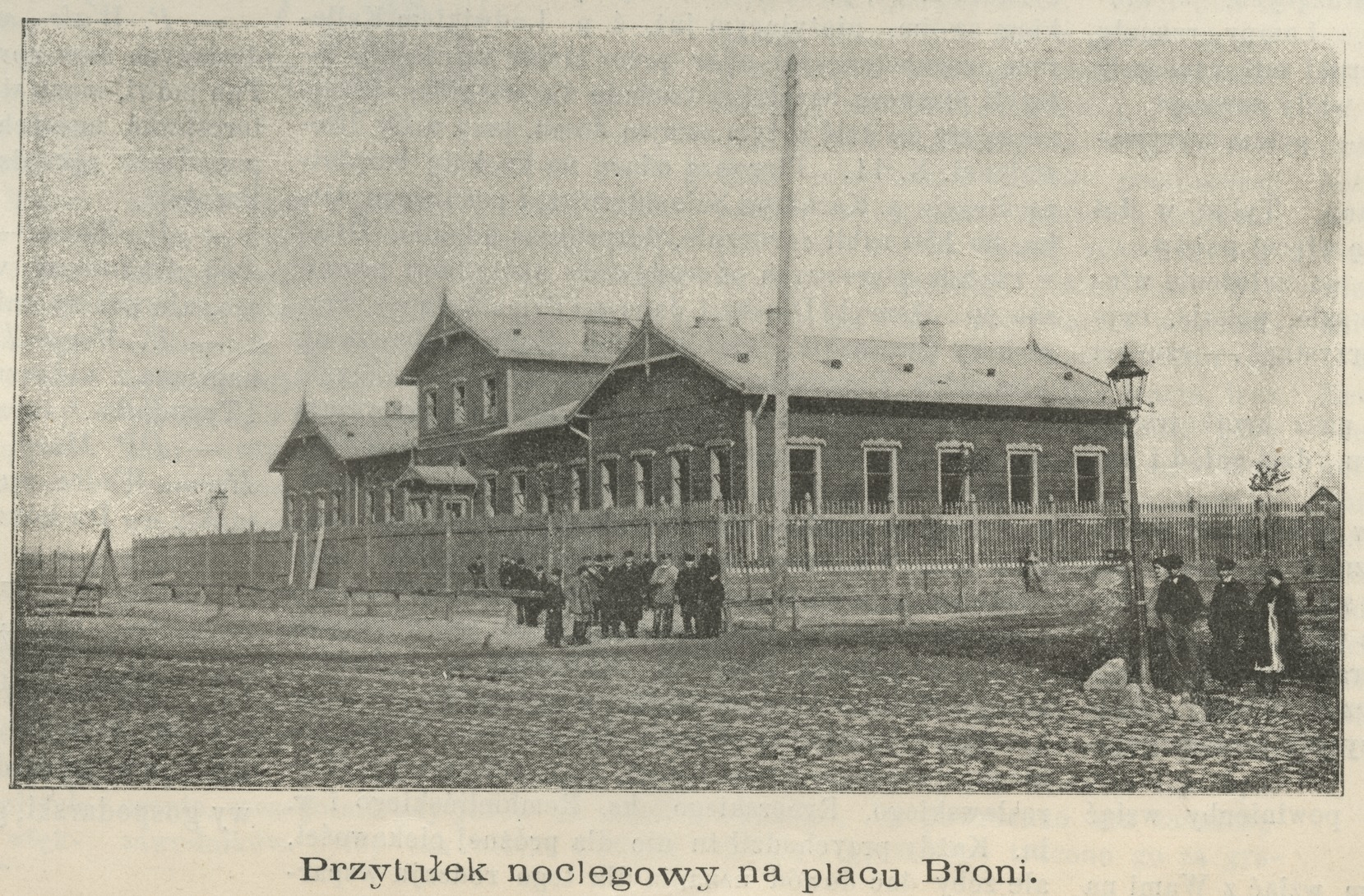 Przytułek noclegowy na placu Broni